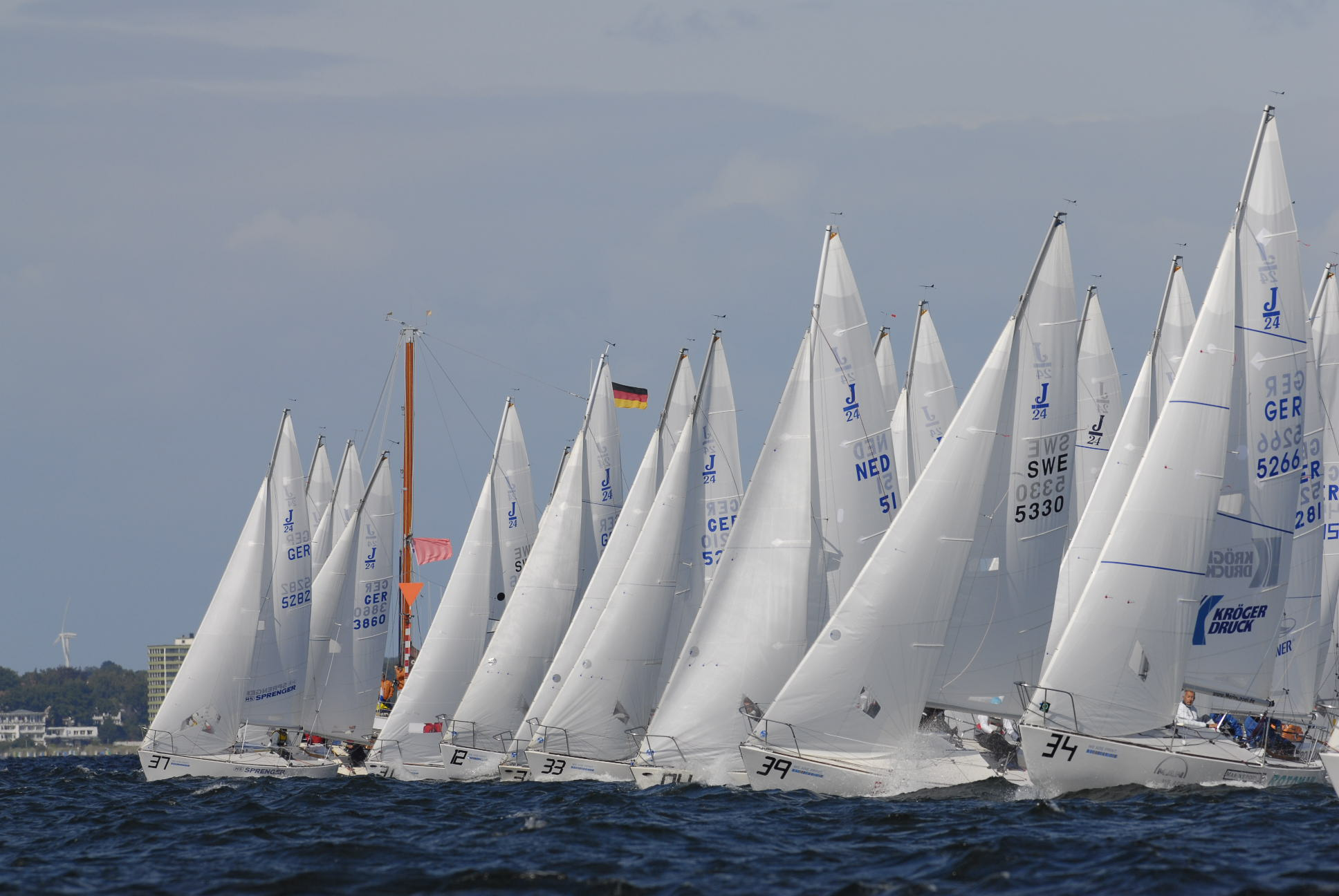 J/24 Europameisterschaft 2007